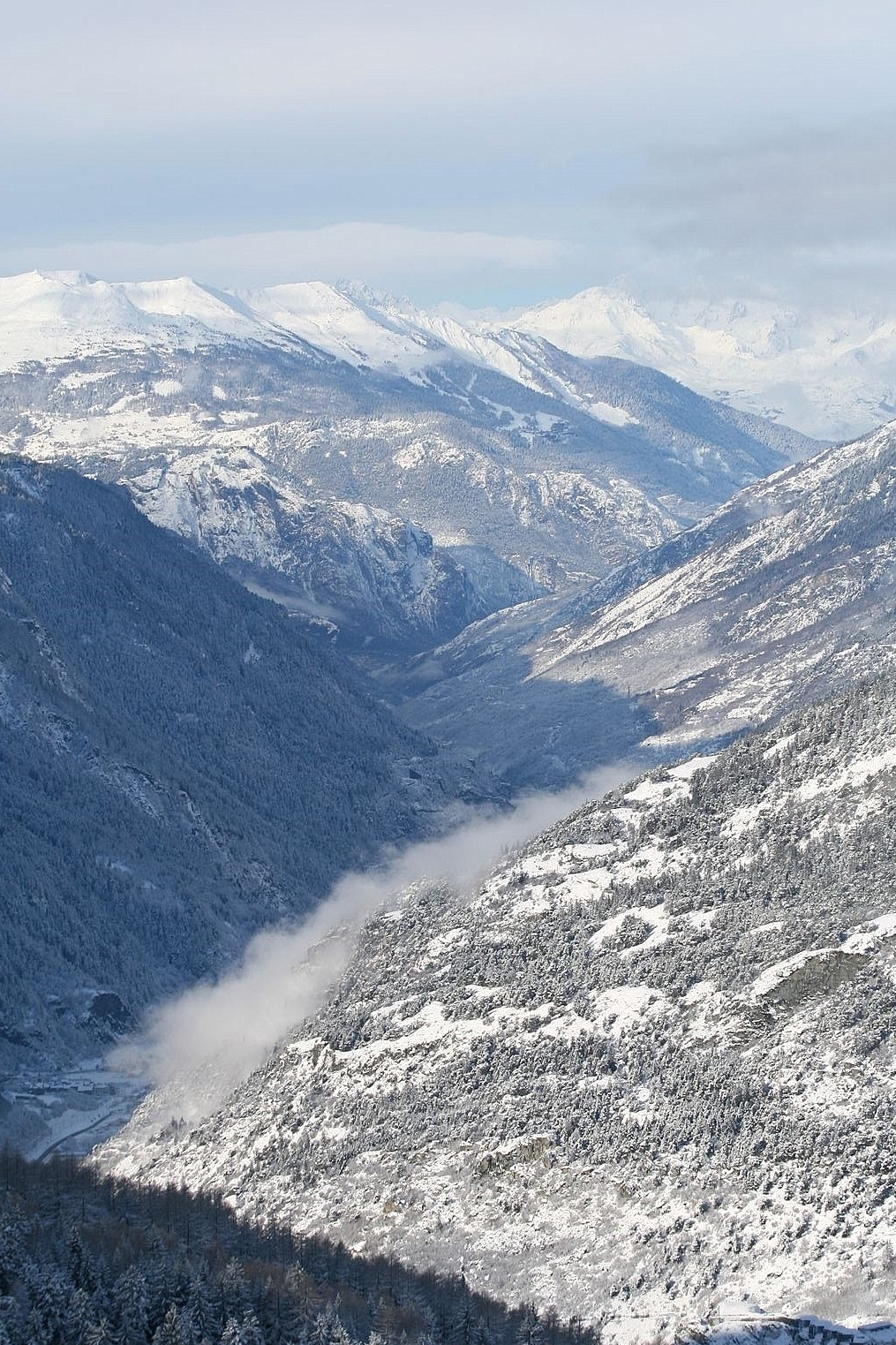 Maurienne in de winter vanuit La Norma.